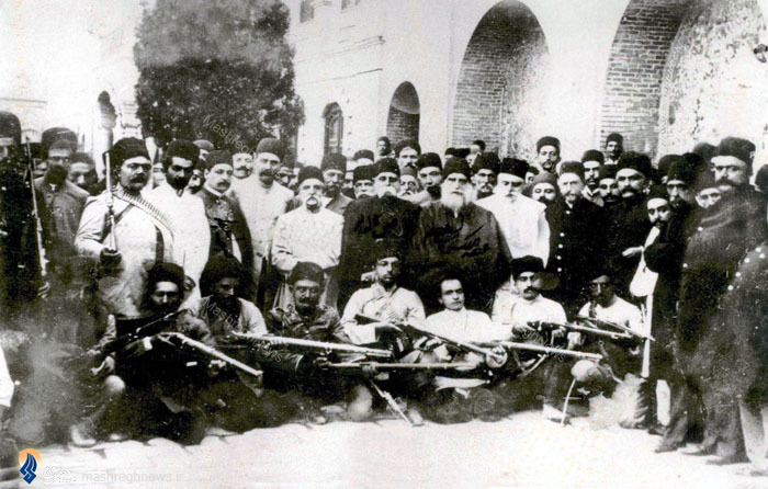 عضدالملک در بین مشروطه خواهان فاتح تهران